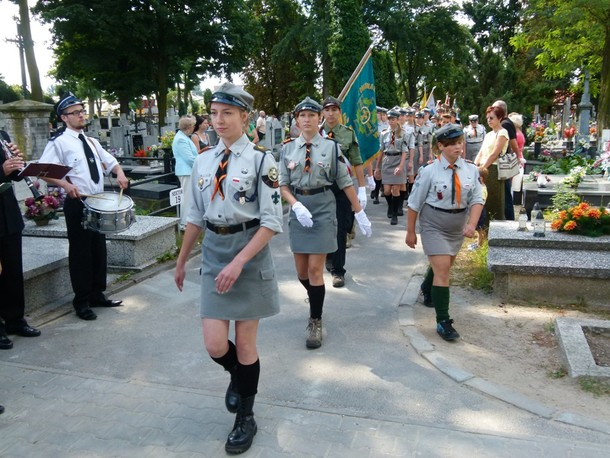 phm. Anna Kamela- drużynowa prowadząca kolumnę Drużyny Reprezentacyjnej Hufca ZHP Kutno podczas obchodów Święta Wojska Polskiego 15 sierpnia 2013r. ze sztandarem szczepu.